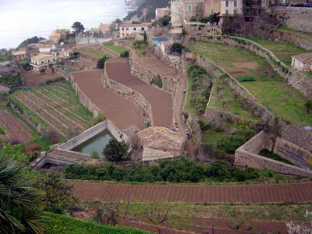 Marjades